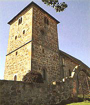 Dorfkirche im Fritzlarer Stadtteil Werkel